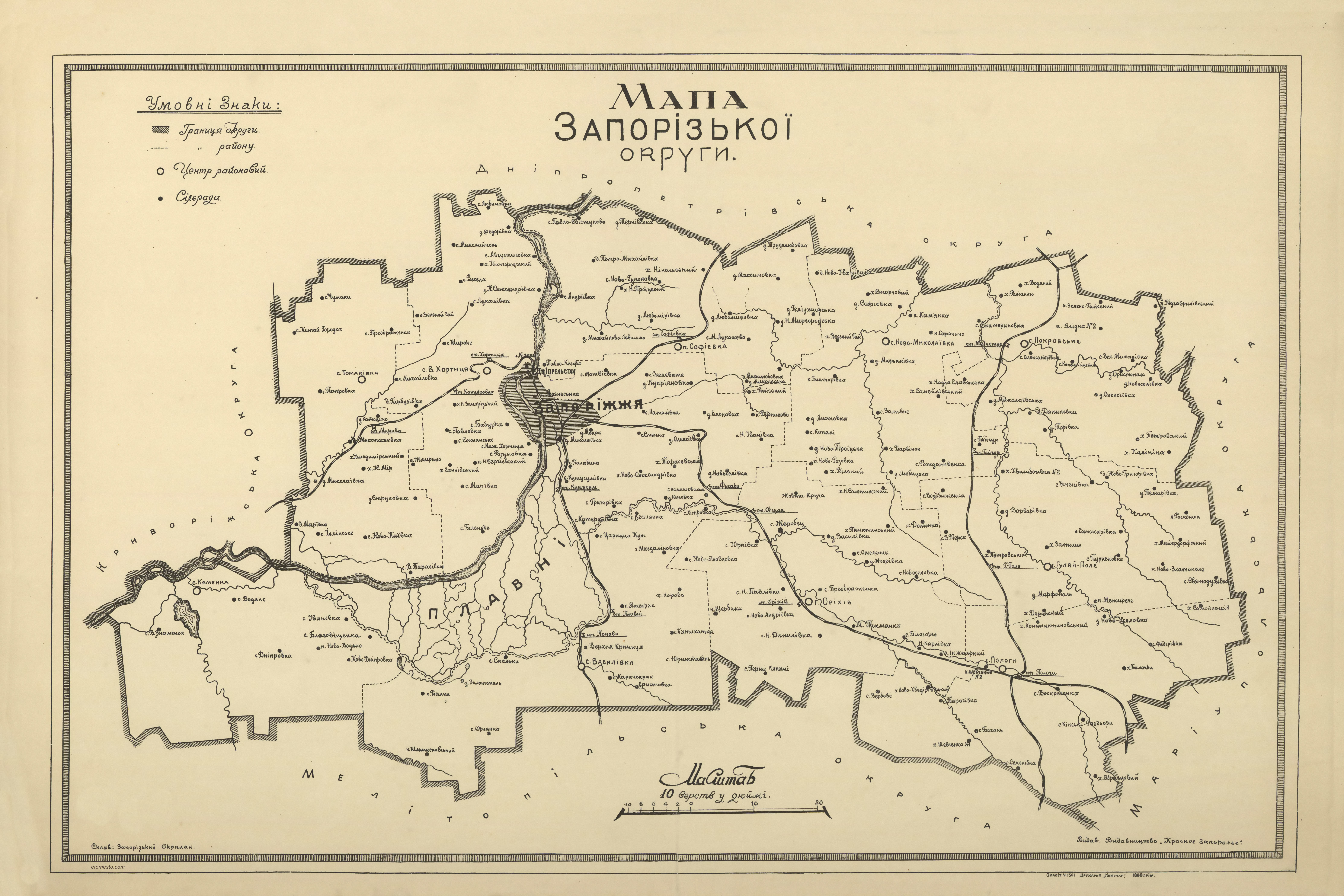 Запорізька округа-1928 року